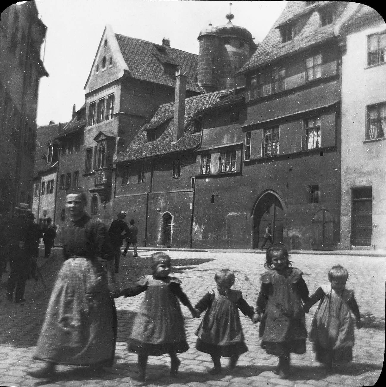 SKC2057 Nürnberg, 1901. Photo: Sigurd Curman